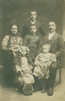 Семейството на Ради Христов – учител в с. Чаир харман (Генерал Колево), Добричко.